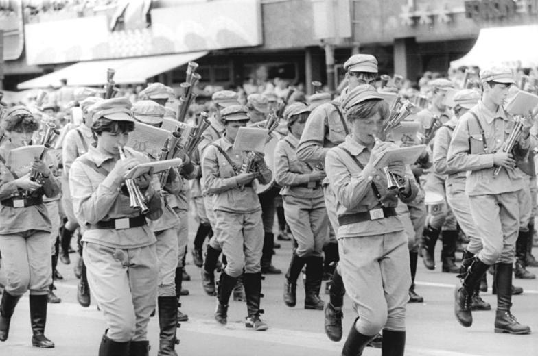 ADN-ZB Oberst 4.7.87 Berlin: Jubiläum-Festumzug. Musikalischer Höhepunkt des Komplexes aus der Zeit der Weltwirtschaftskrise war das Spiel eines vereinigten Schalmeien-Orchester der FDJ in RFB-Uniformen.